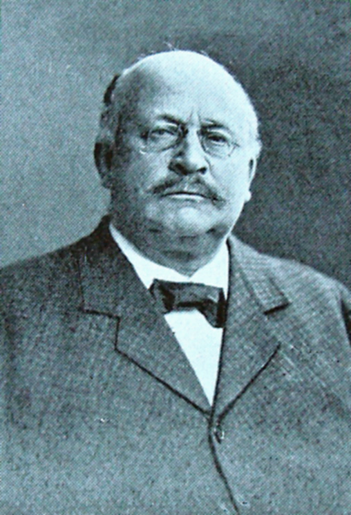 Peter Adler Alberti 1851–1932, dansk politiker og minister.